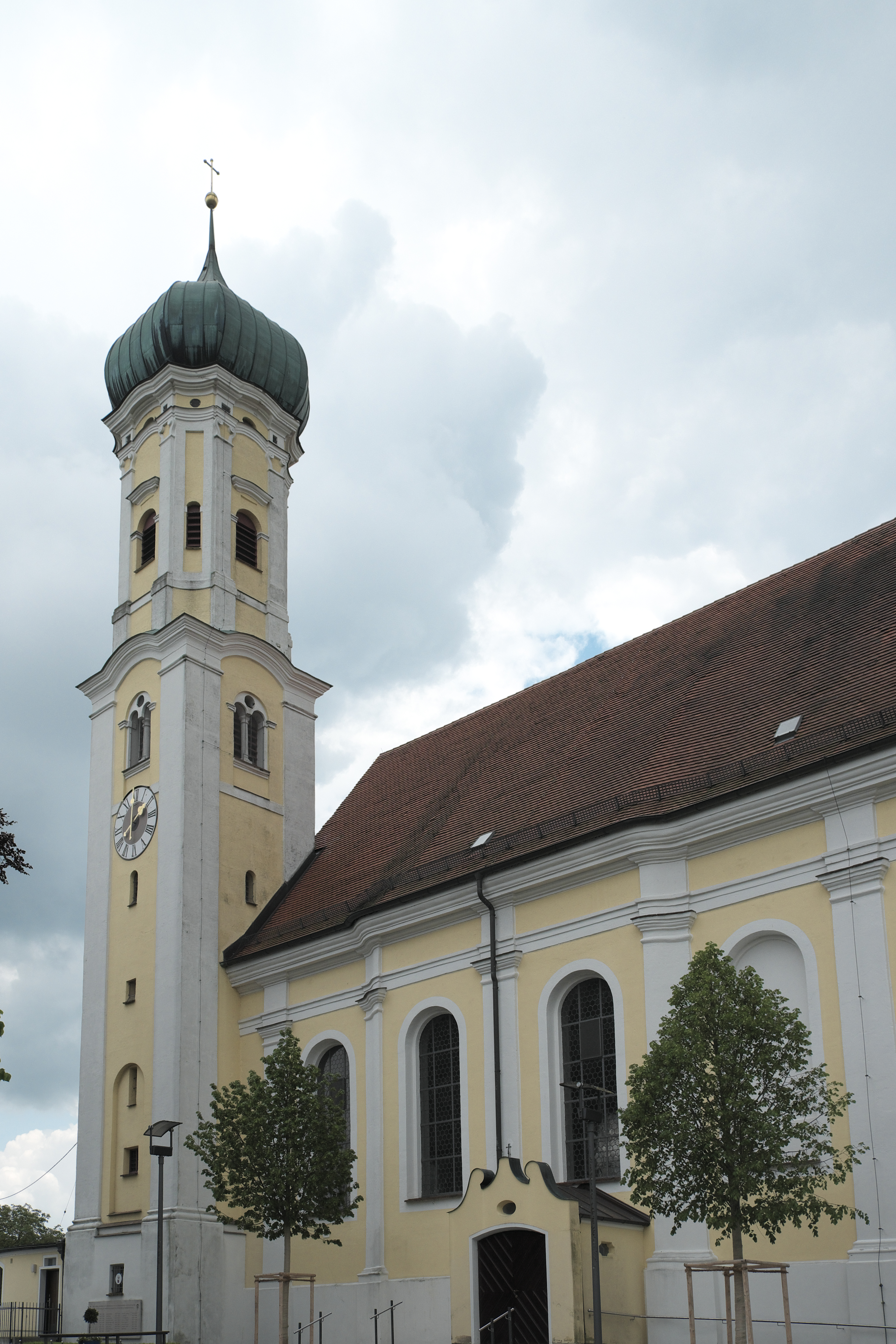 Katholische Wallfahrtskirche Maria Vesperbild in Ziemetshausen im Landkreis Günzburg (Bayern), Neubau durch Johann Georg Hitzelberger, 1756 geweiht